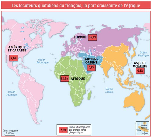 Carte de répartition des locuteurs quotidiens du français dans le monde en 2014. La part croissante de l'Afrique.